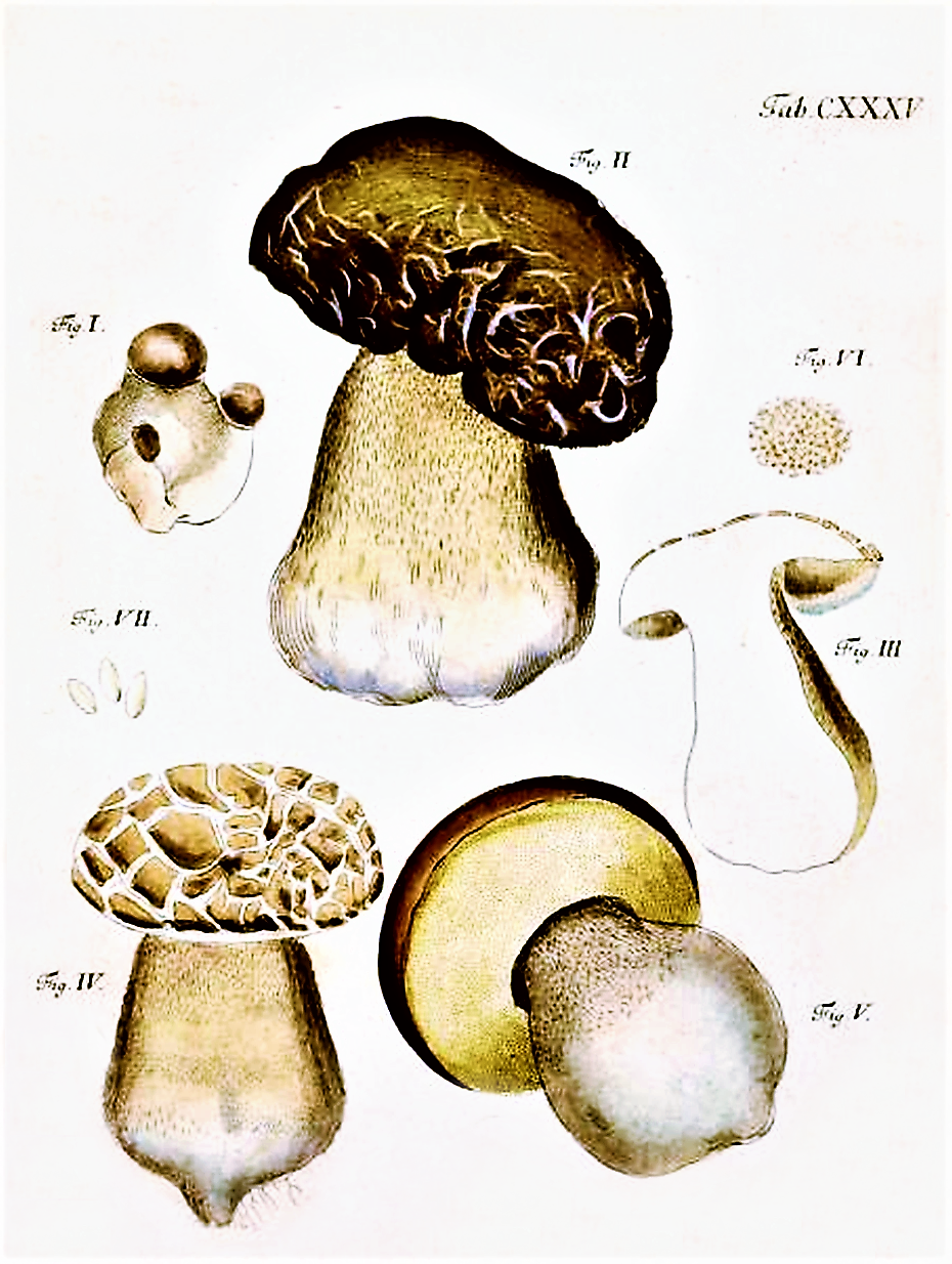 Jacob Christian Schäffer: Boletus reticulatus